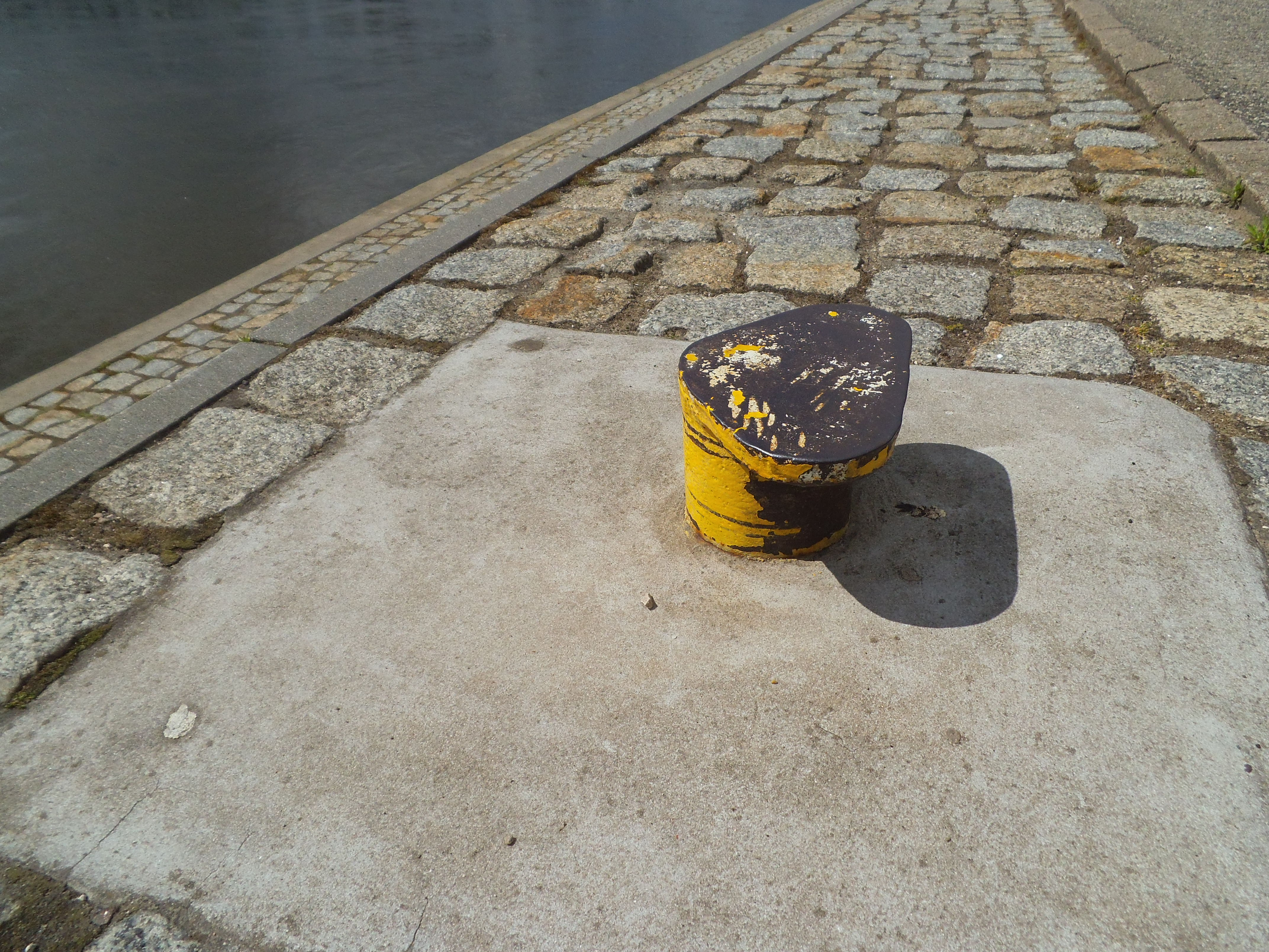 Fragment Bulwaru Filadelfijskiego w Toruniu - miejsce cumowania statków